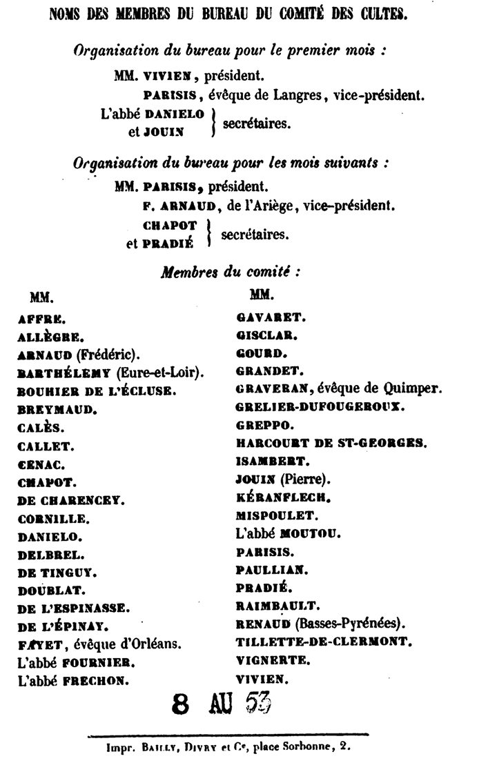 « La question religieuse en 1682, 1790, 1802 et 1848 et historique complet des travaux du comité des Cultes de l’Assemblée constituante de 1848 », par Pierre Pradié (secrétaire du comité), Paris, Sagnier et Bray, 1849, p. 444 (liste des membres)